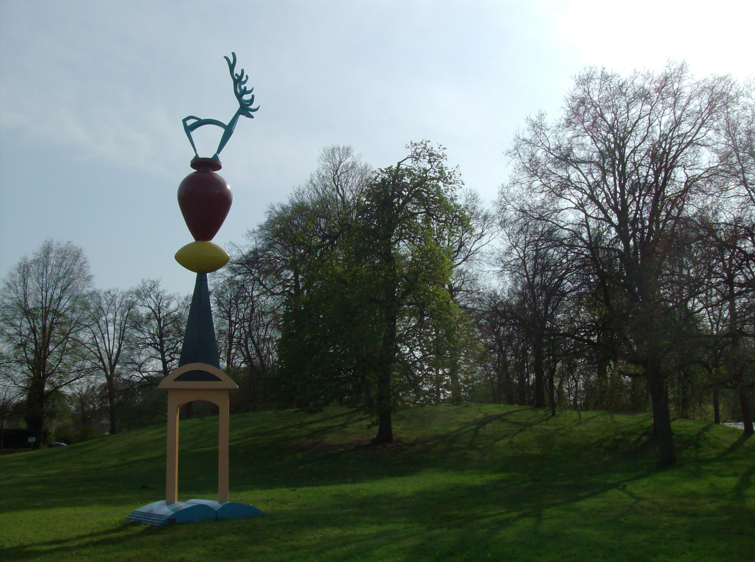 Gedenkteken (Le Chêne) van André Boone bij de Spoolderberg in Zwolle/Nederland